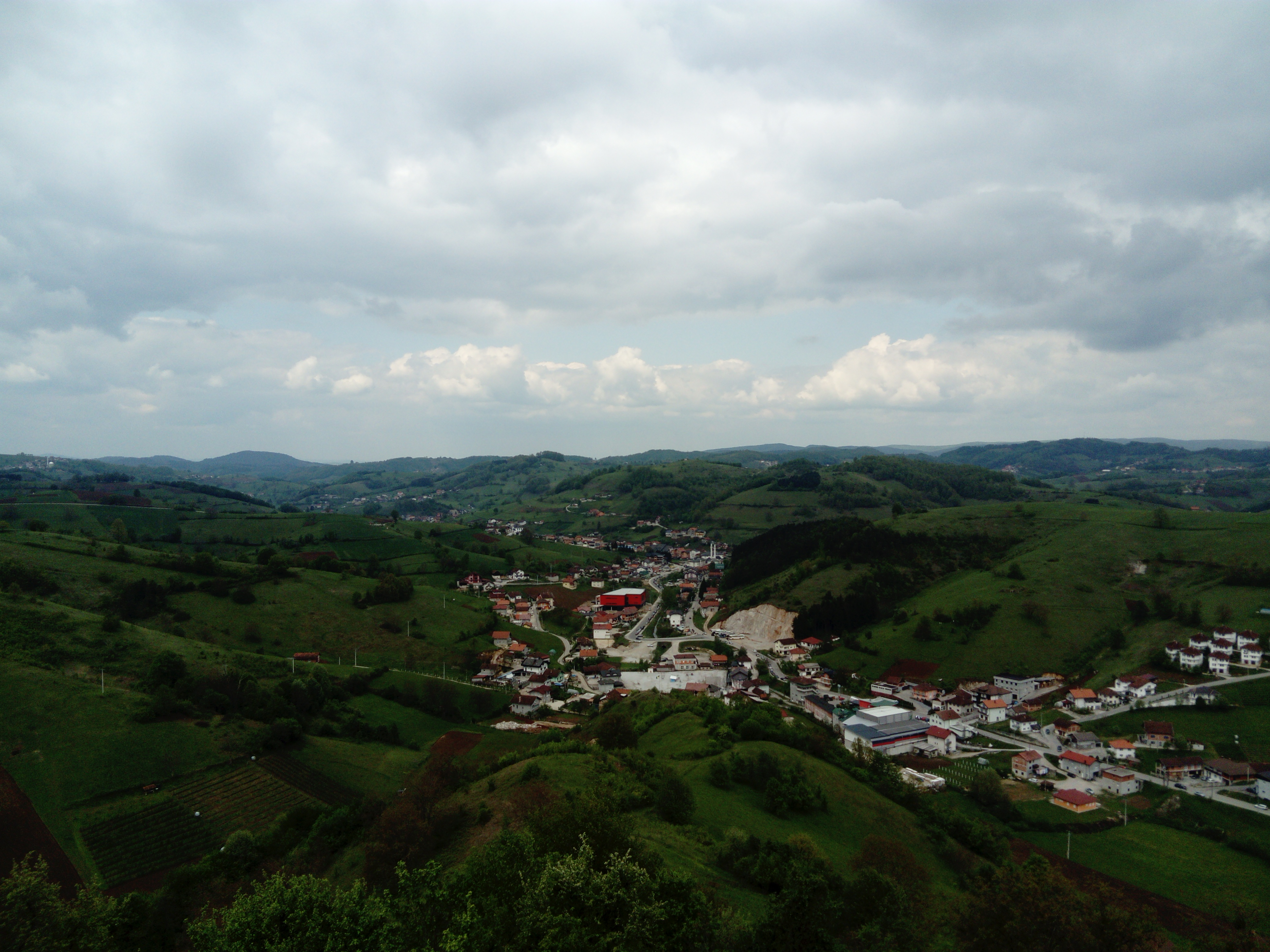 Pogled na Bužim sa starog grada